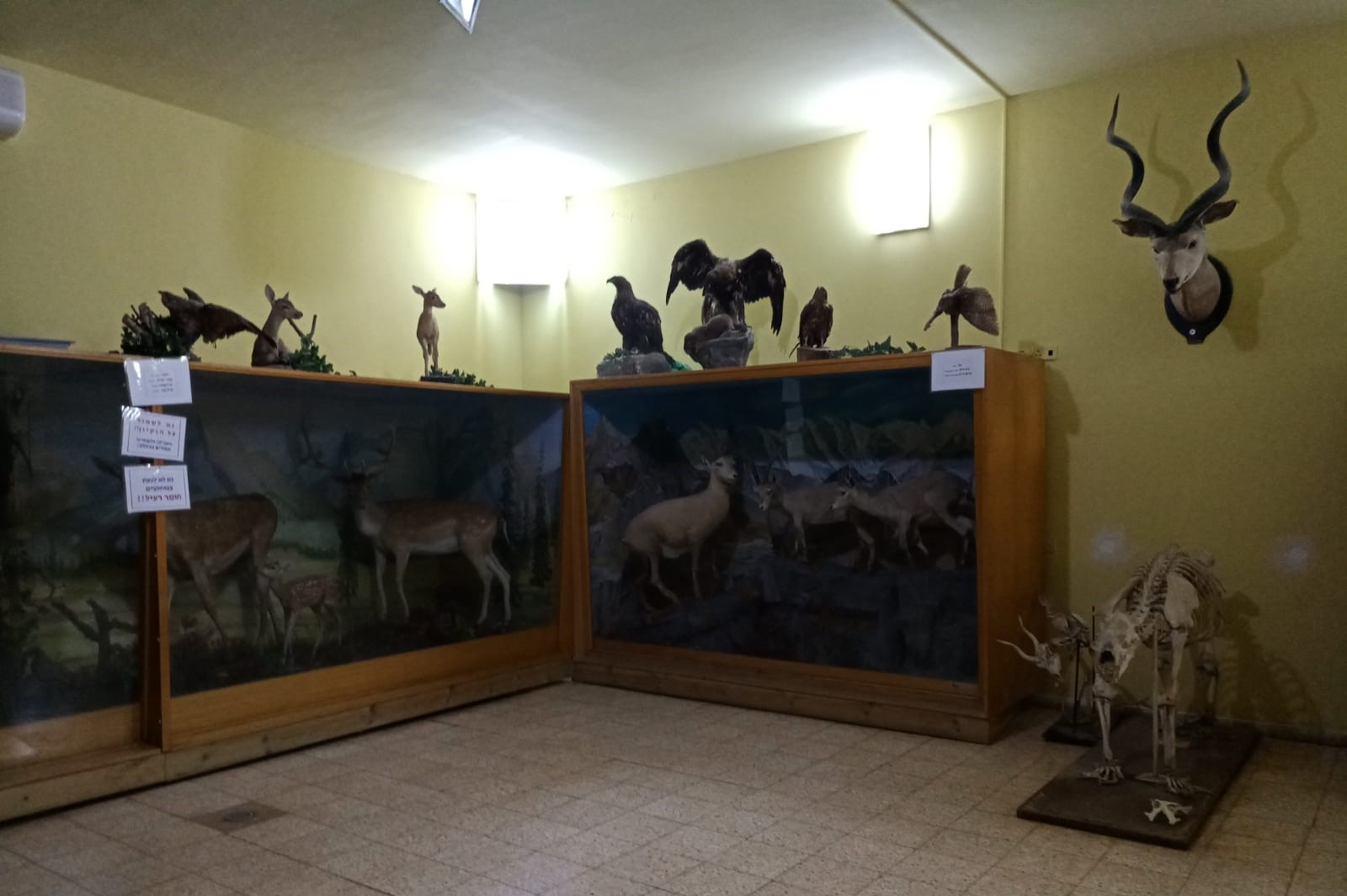 גן החי